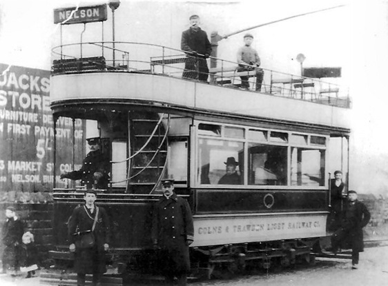 Colne and Trawden Light Railways Company. A motorman and conductor (seemingly in informal attire) pose with Tramcar No 4, along with an individual who may be an inspector - photo undated, but probably mid Edwardian. With thanks to Jim Halsall.